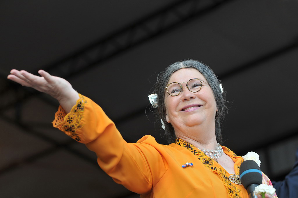 Veteranendag 2009 Den Haag